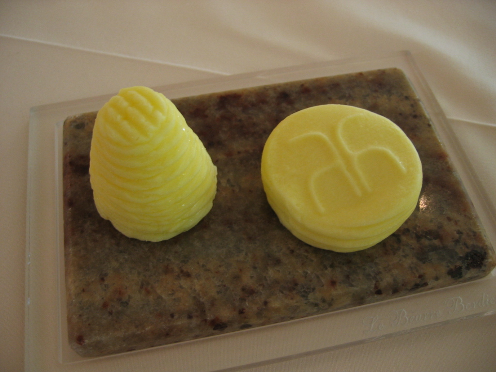 Auberge Marc et Paul Haeberlin - Alsace